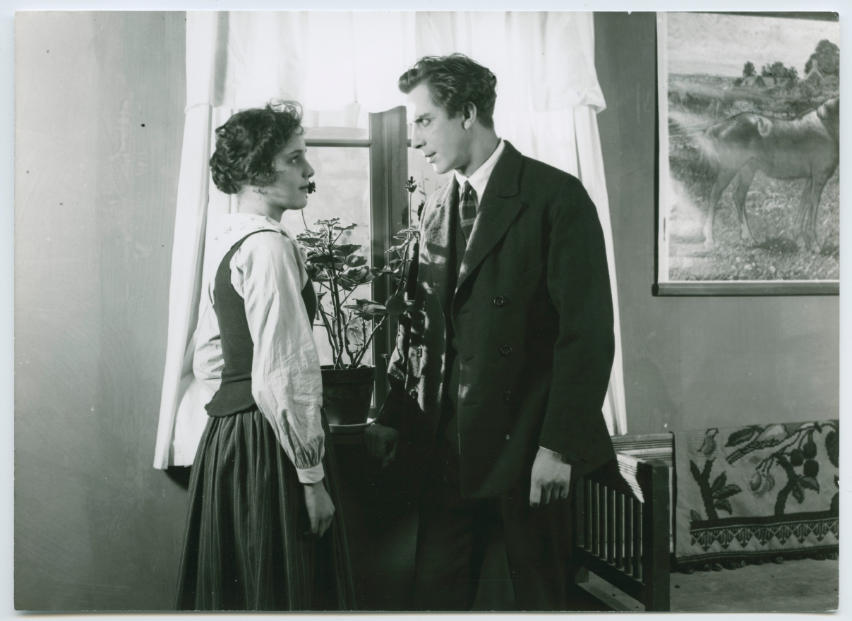 Lars Hanson och Mona Mårtenson som Ingmar och Gertrud (ur filmen Ingmarsarvet (1925), efter Selma Lagerlöfs Jerusalem).